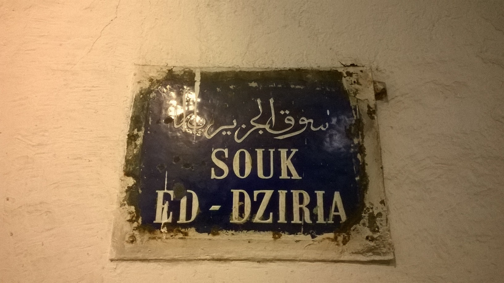 La médina de Tunis مدينة تونس العتيقة